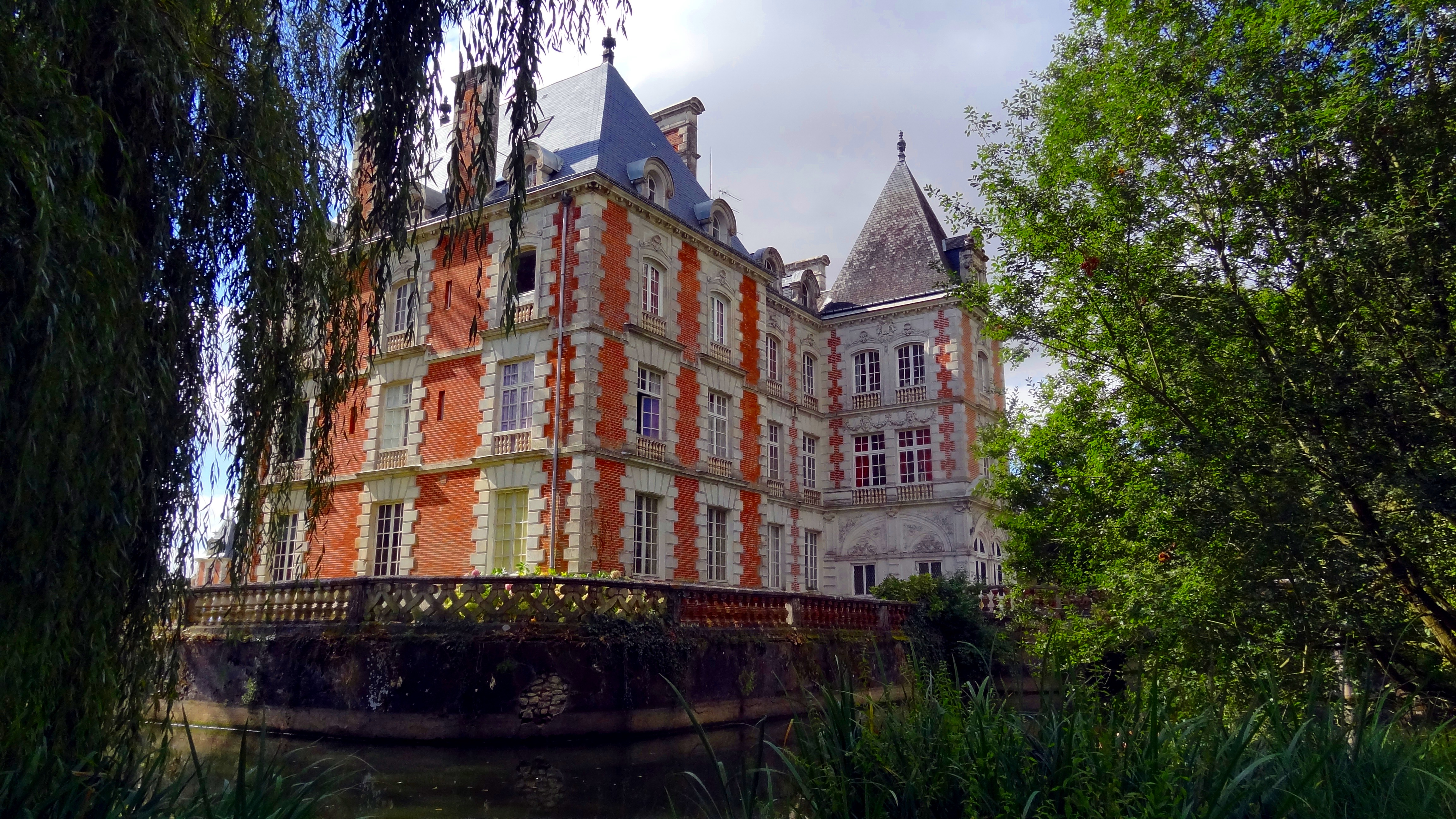 Château de Rocheux, Lignières, Loir-et-Cher, France